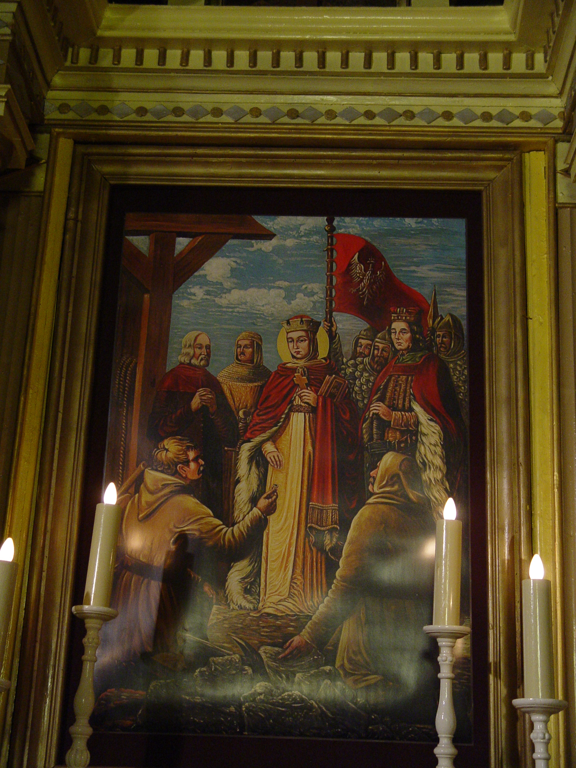 Bochnia, ul. Campi 15 - zabytkowa część kopalni soli, kaplica św. Kingi (zabytek nr A-238)